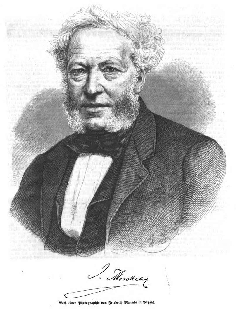 Ignaz Moscheles, böhmisch-österreichischer Komponist, Pianist und Musikpädagoge.